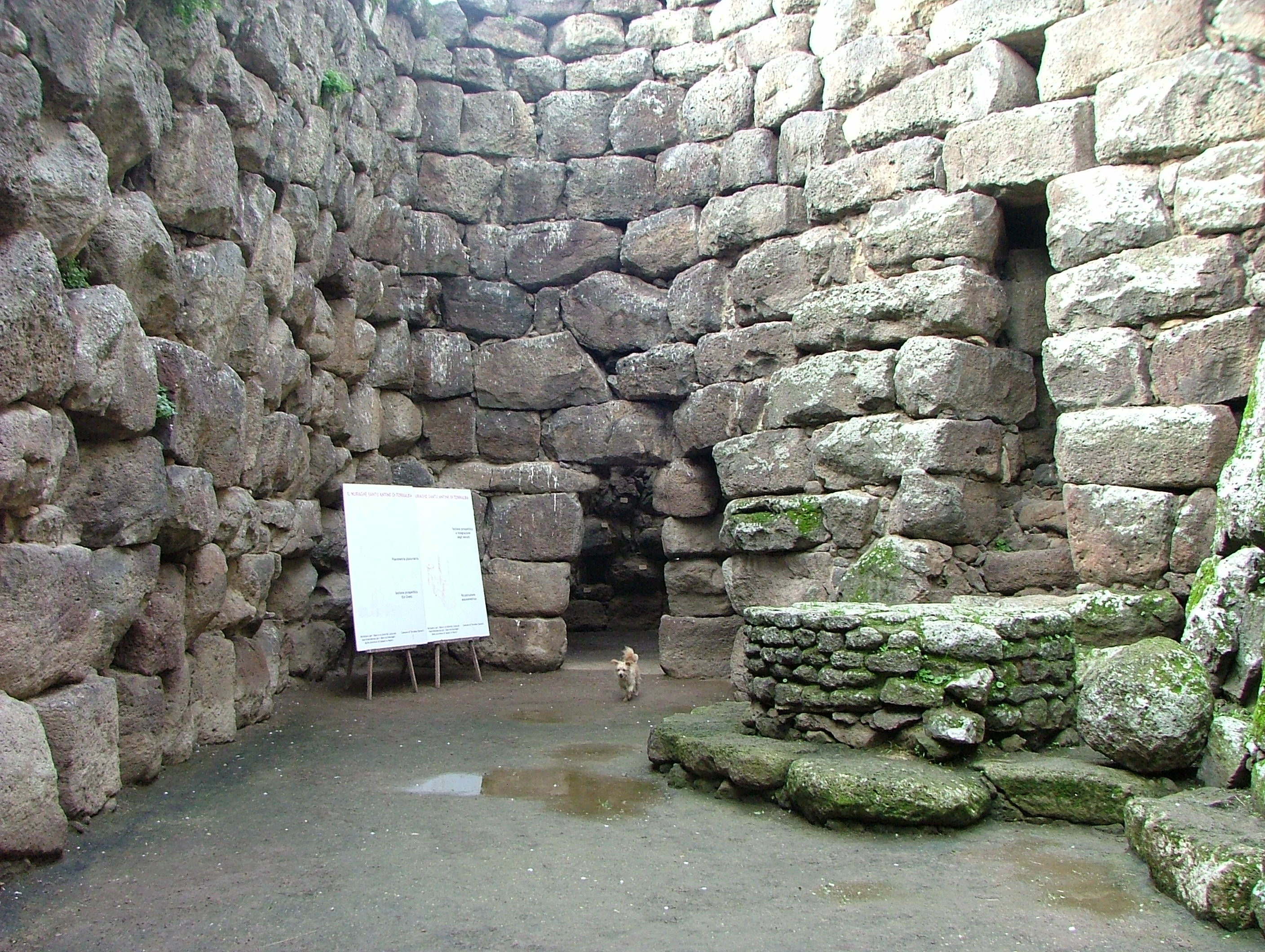 Foto di: Giovanni Seu Cortile interno del Nuraghe di Santu Antine, Torralba.